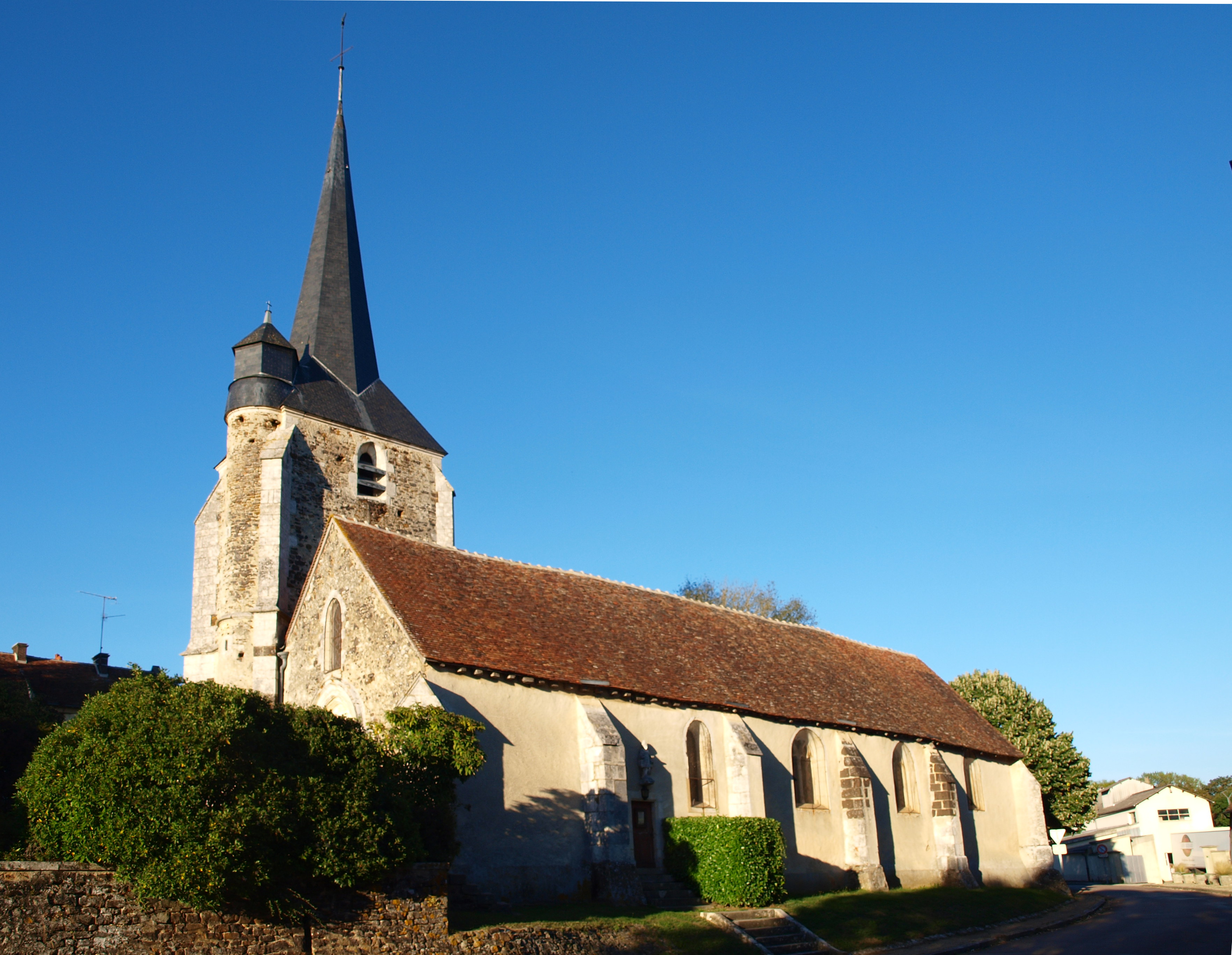 Moulins-sur-Ouanne ; église